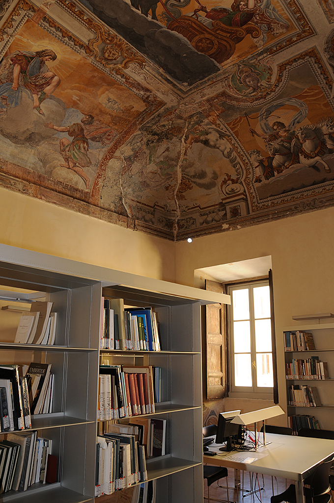 Biblioteca Comunale di Spoleto Giosuè Carducci, una delle tante splenddie sale di Palazzo Mauri